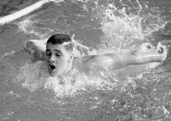 Internationale zwemwedstrijden in Bremen , Carl Robie (Amerika) in actie